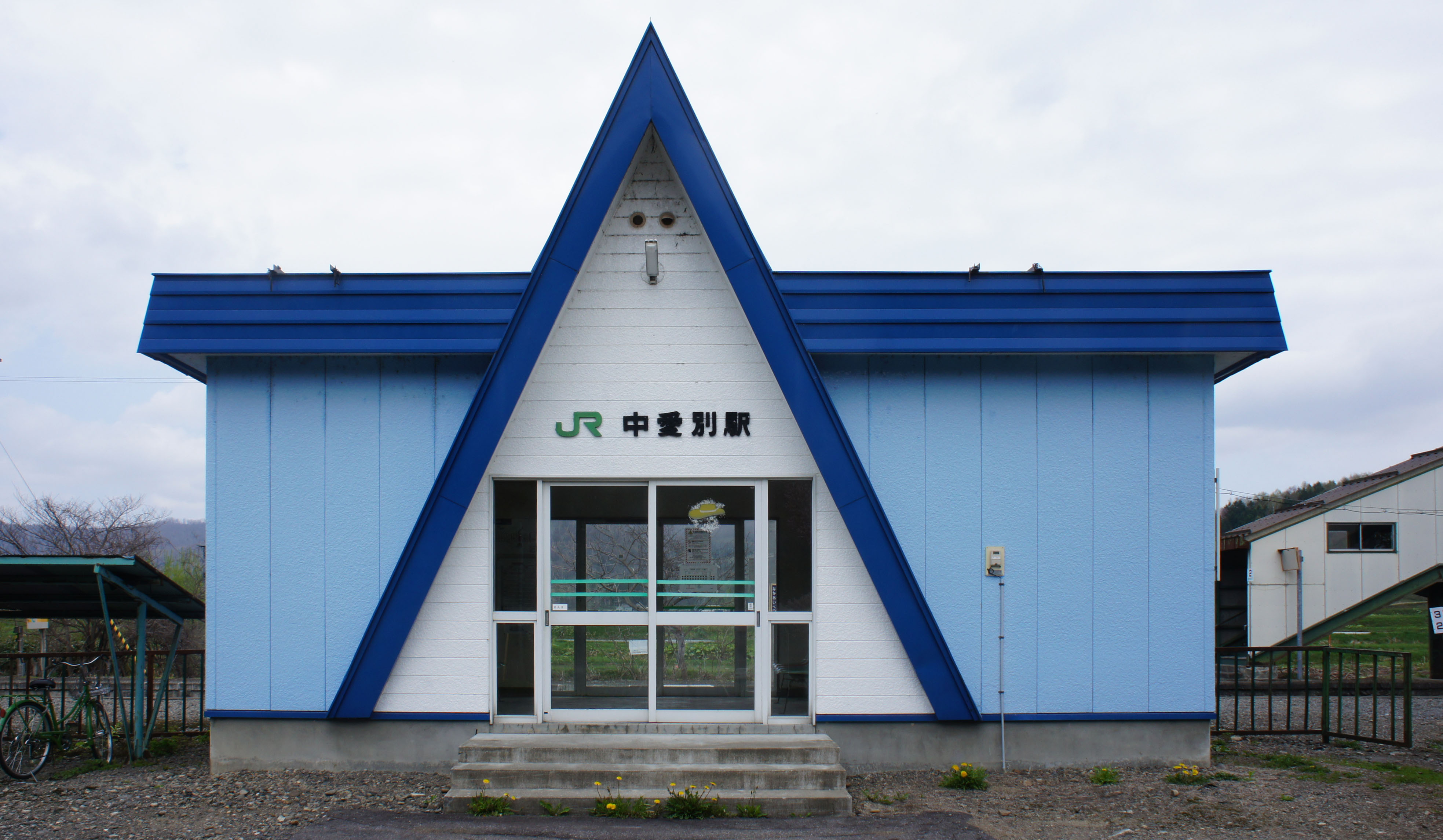 JR石北本線・中愛別駅の駅舎